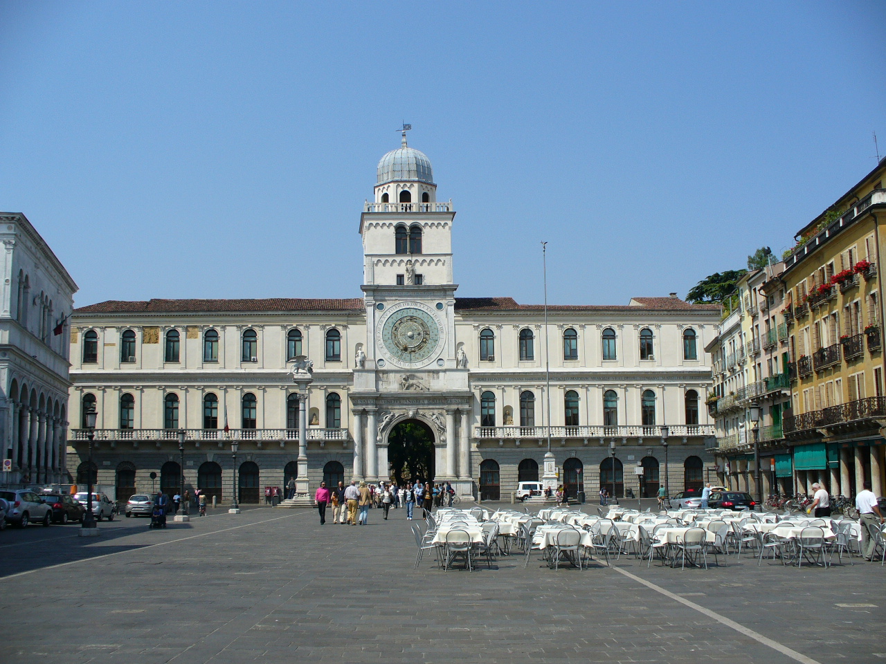 (Praça dos senhores)